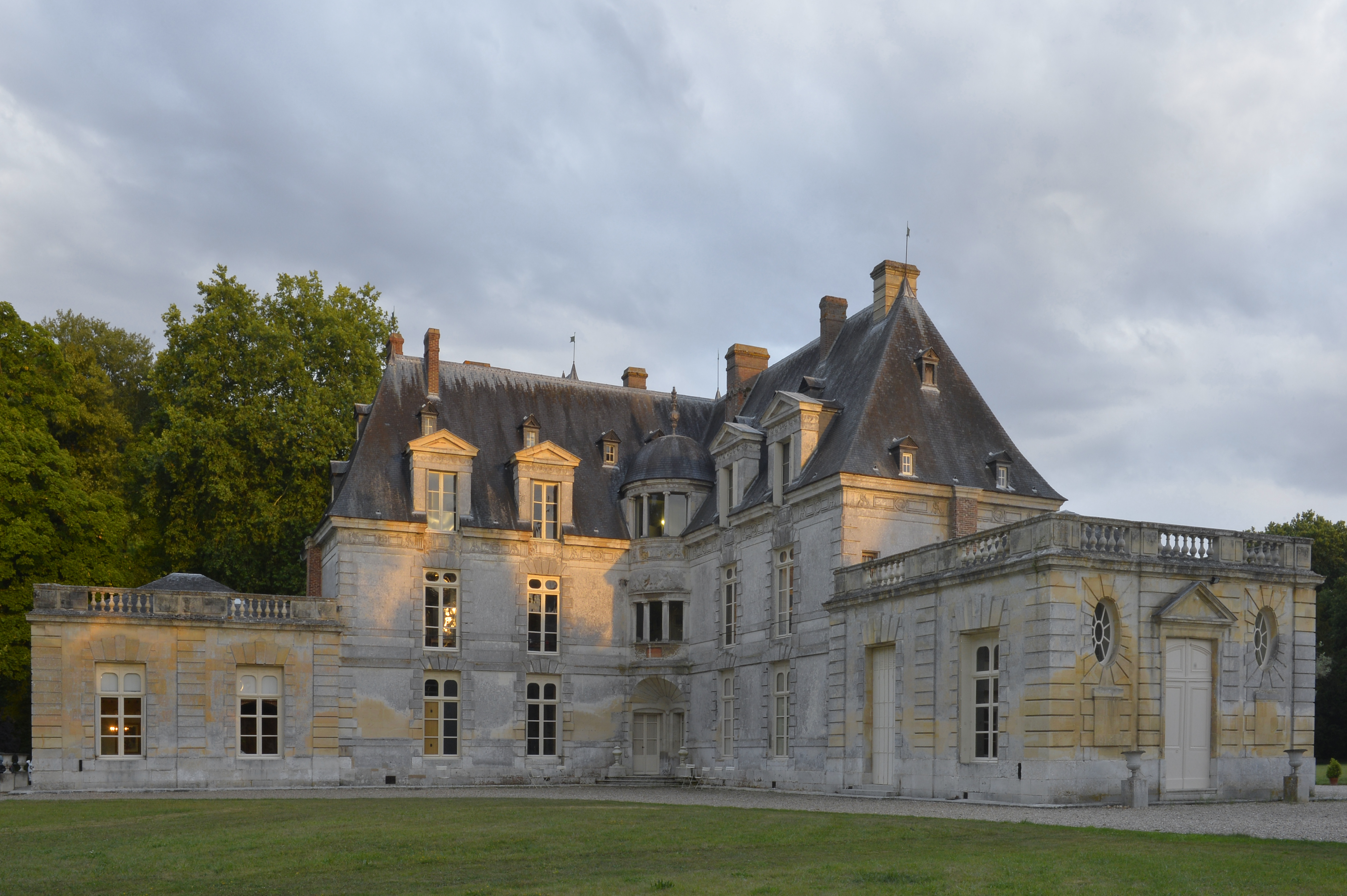 Au milieu du XVIème siècle, Anne de Laval, membre de la prestigieuse famille des Montmorency, cousine du roi de France Henri II et dame d’honneur de Catherine de Médicis fit construire dans un site préservé – où chaleur, verdure et eaux vives se conjuguent – une “Maison des champs” en s’inspirant de l’éternel amour envers son mari, Louis de Silly, seigneur de la Roche-Guyon.